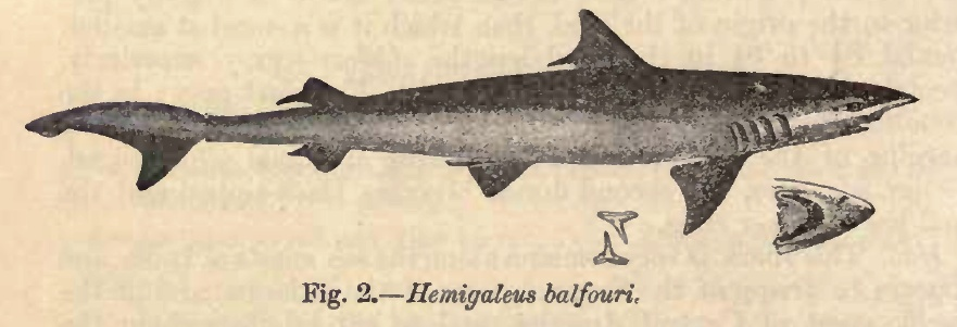 Hemigaleus balfouri = Chaenogaleus macrostoma (Bleeker, 1852)